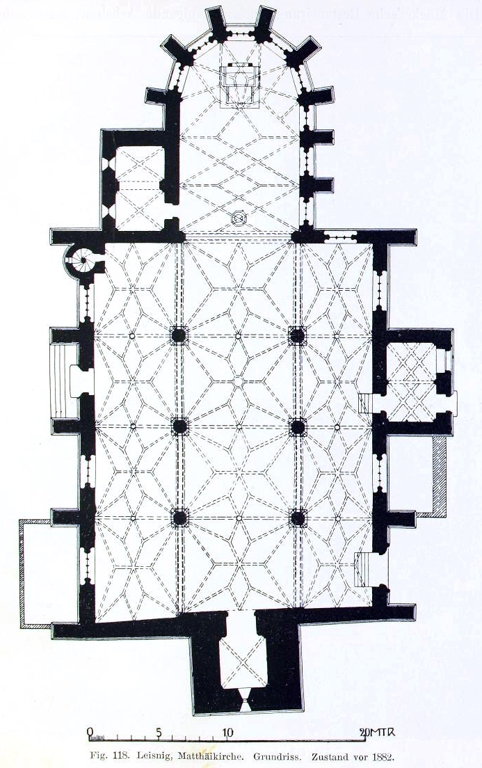 Leisnig, Grundriss der Kirche St. Matthäi